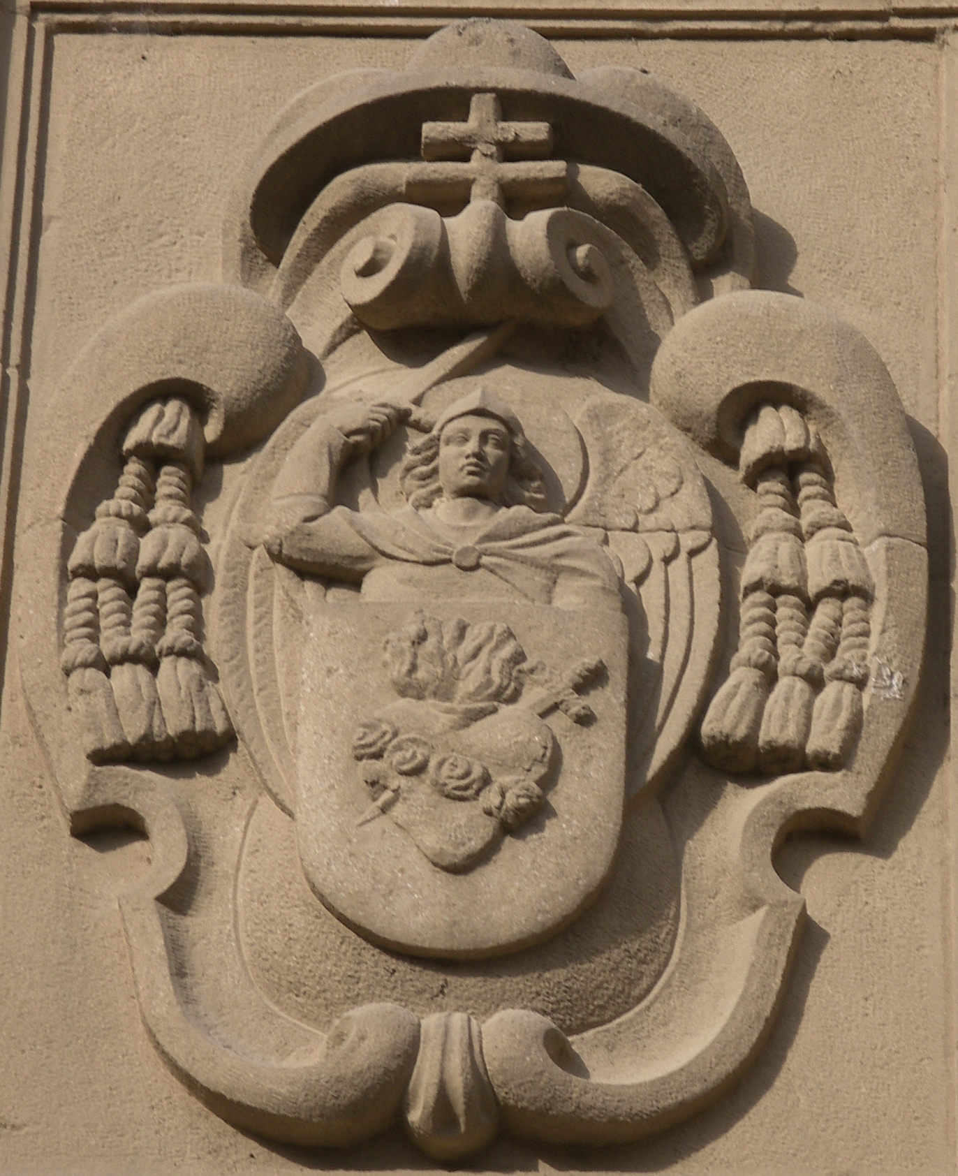 Escudo de los Misioneros Claretianos en el Templo de Sant Antoni M. Claret en Vic